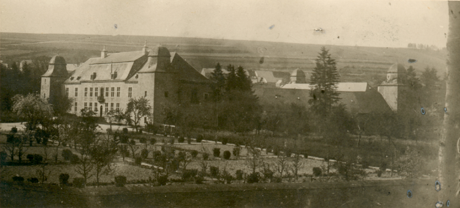 Le Château de Bure, vu des jardins. Photo prise vers 1900 et conservée dans les archives du Collège d'Alzon.